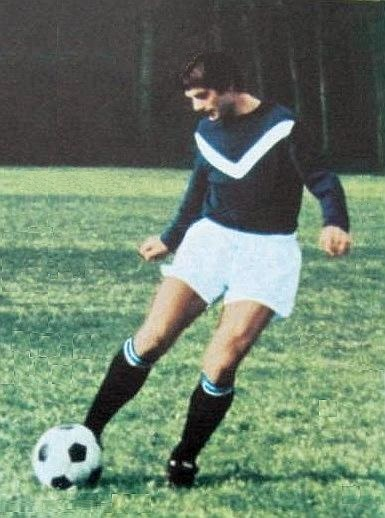 Alain Giresse en 1971, Panini Ageducatifs 'Football en Action 1971 - 1972', n°61.